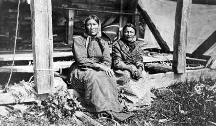 Photo de femmes autochtones